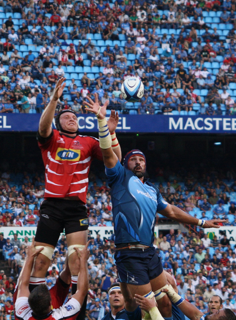 Victor Matfield et un joueur des Lions se disputant le ballon sur une touche lors du match de Super 15 entre les Bulls et les Lions le 26 mars 2011.